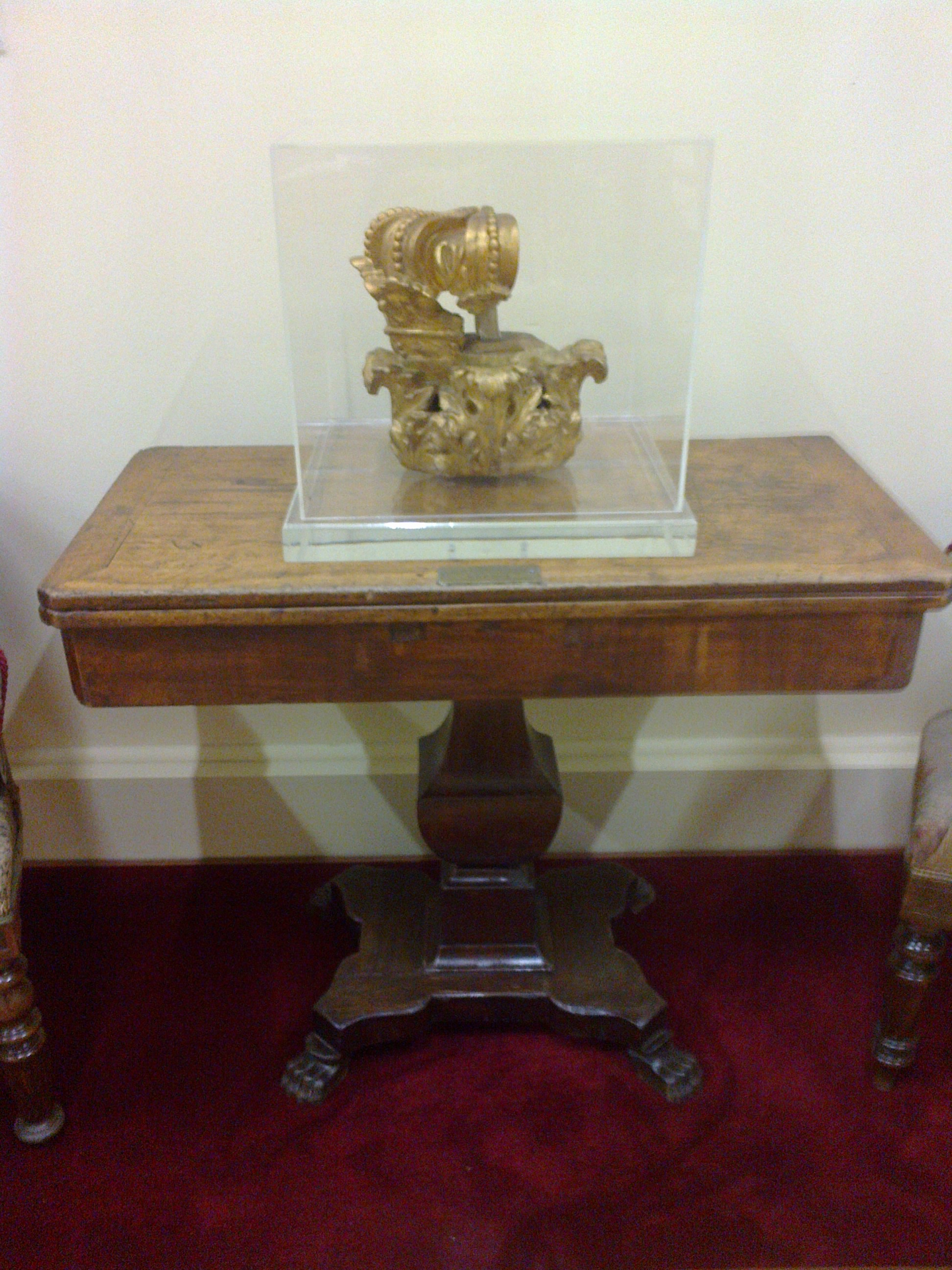 Mvskoke: Τραπέζι και σπάραγμα στέμματος